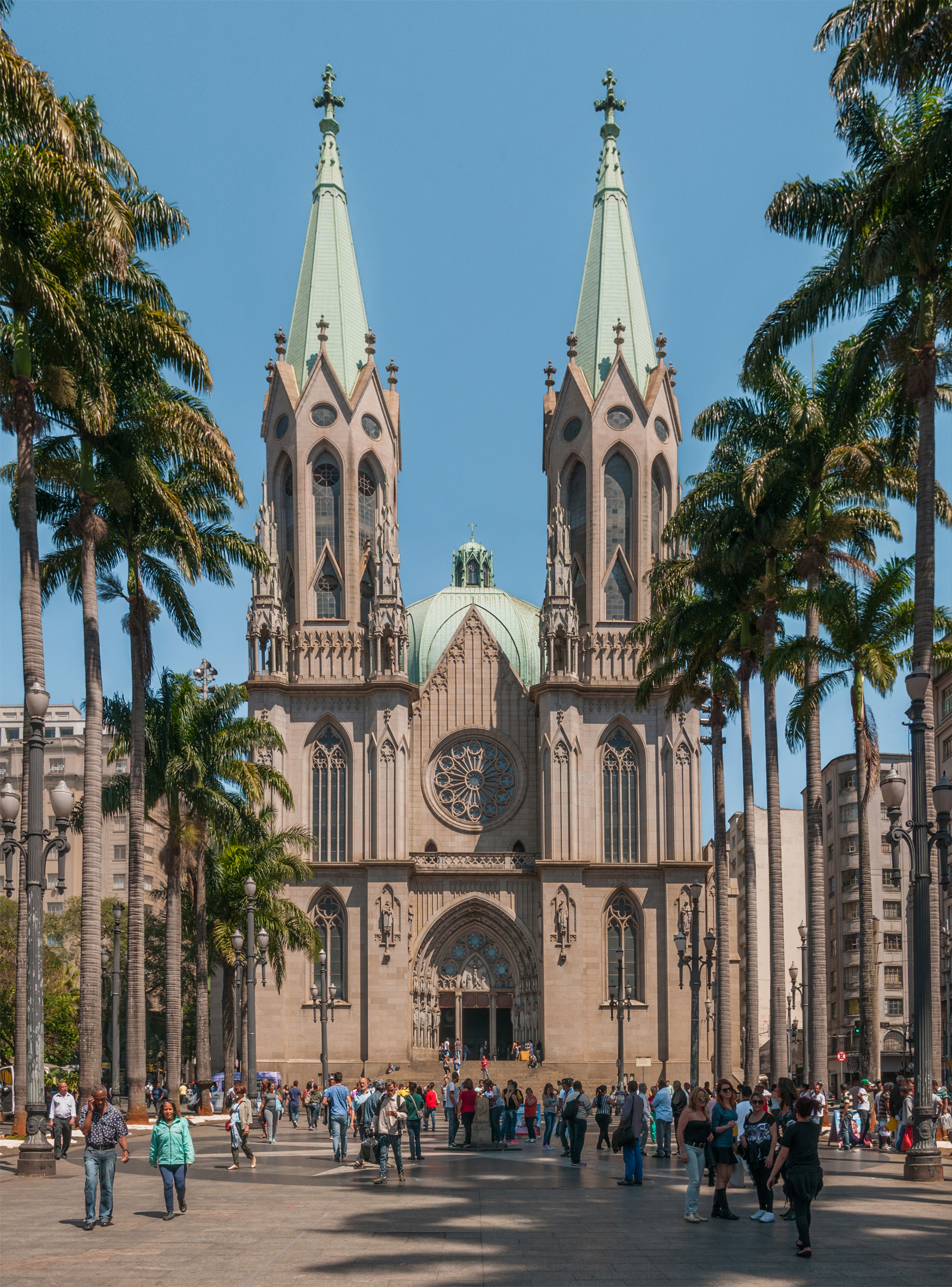 Domingo na Catedral da Sé em São Paulo